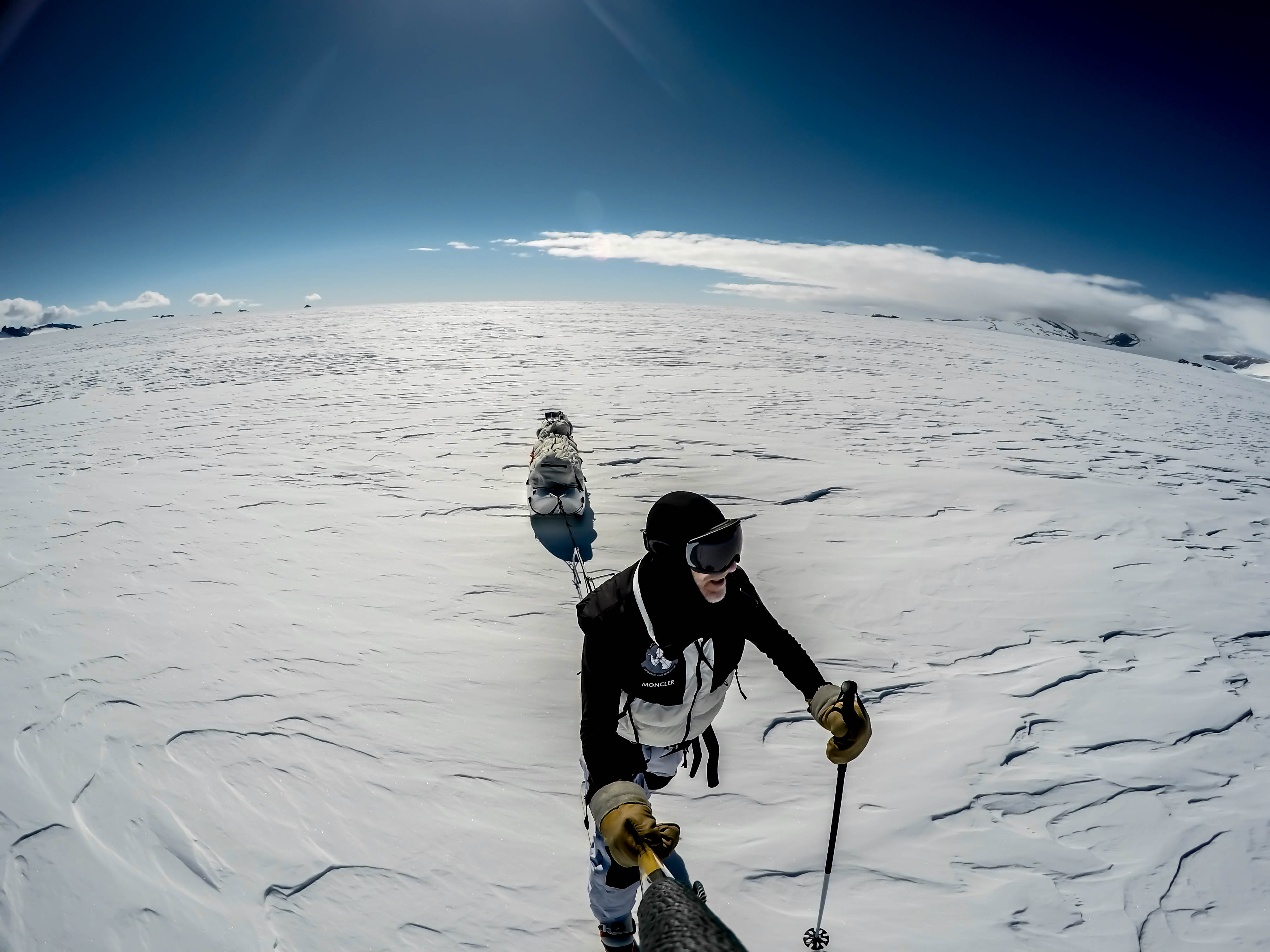 Queen Maud Land